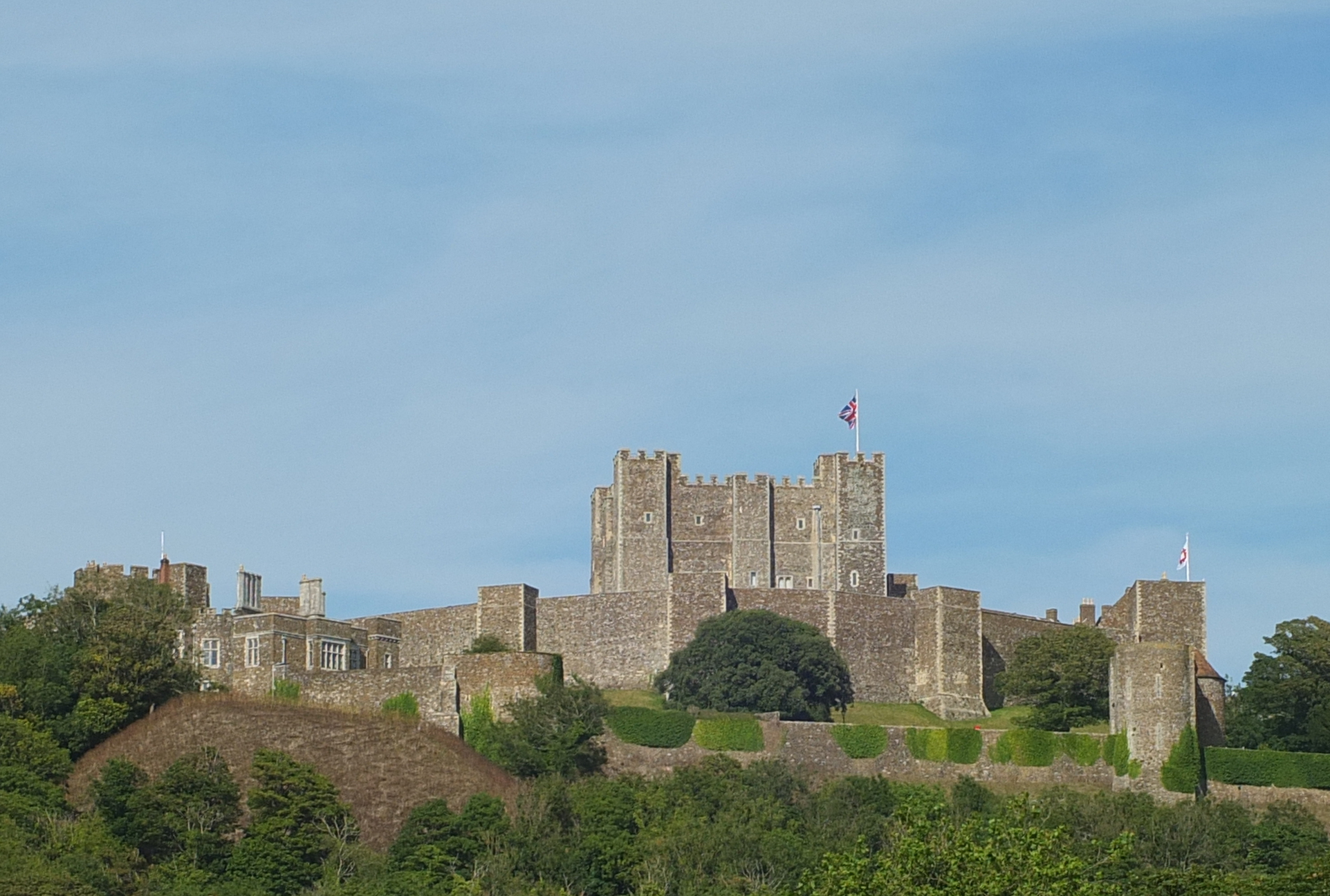 Dover Castle is een middeleeuws kasteel in Dover in het Engelse graafschap Kent.